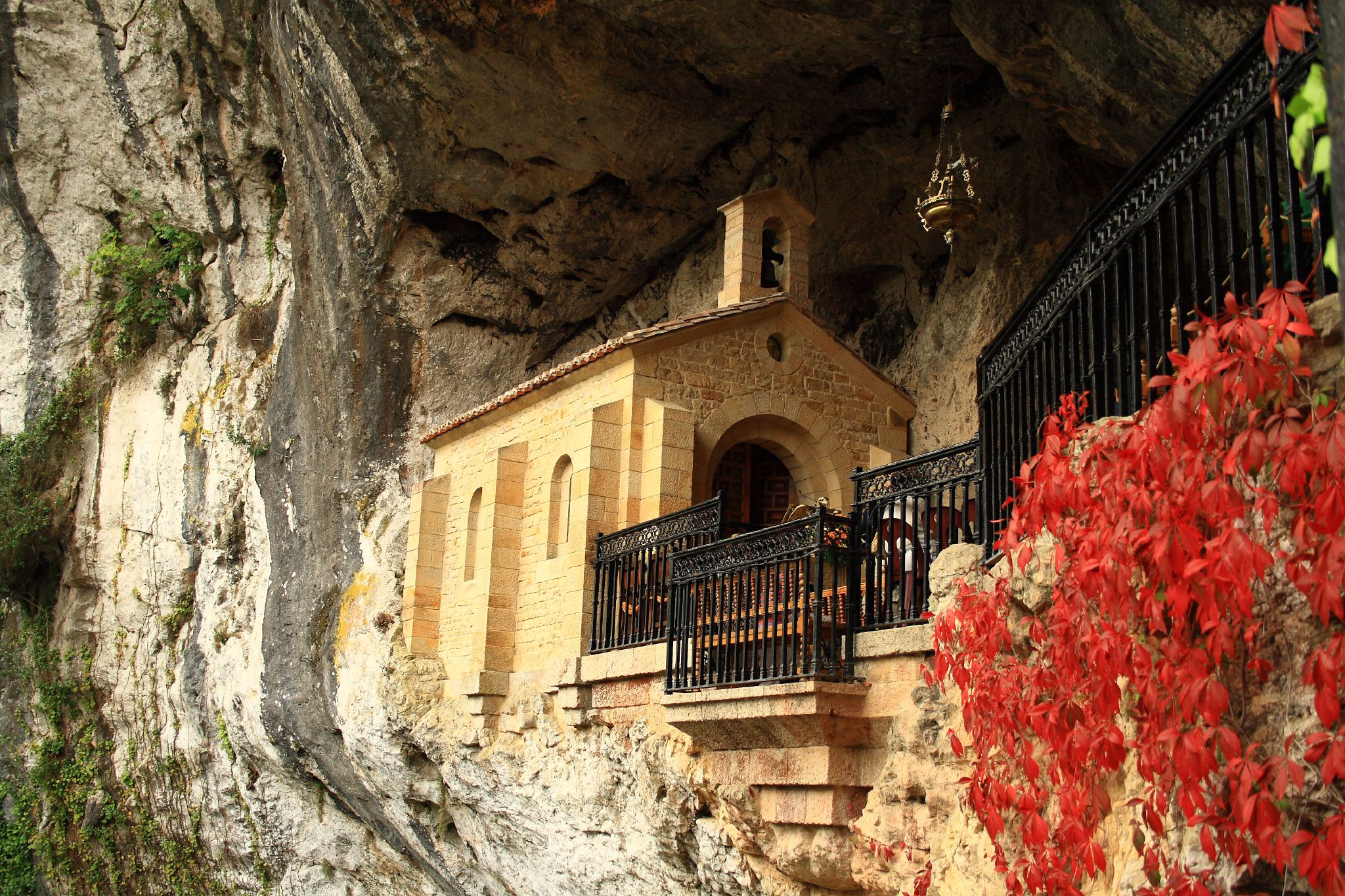 Vista de cerca de la "Santa Cueva"